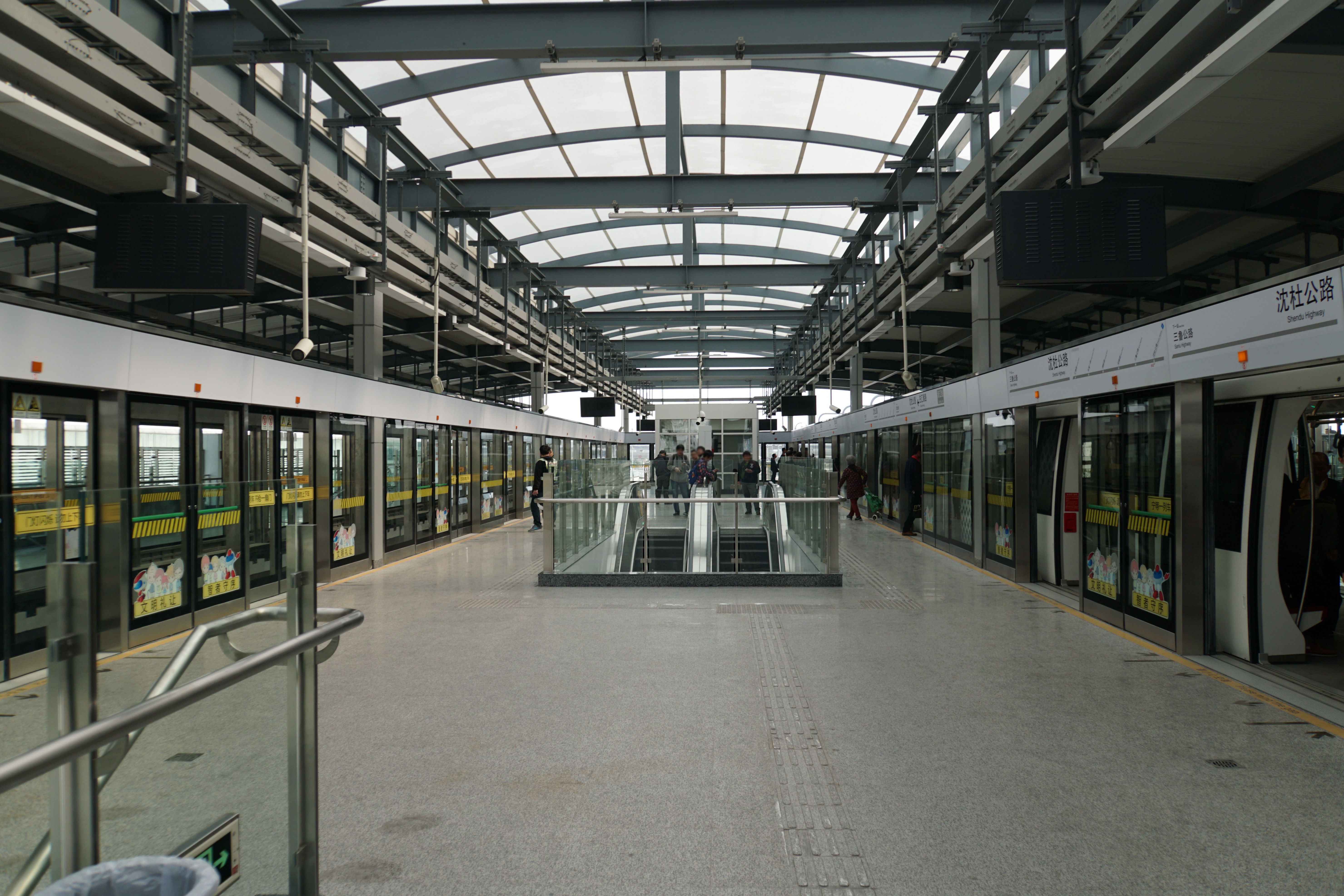 浦江线沈杜公路站岛式站台部分